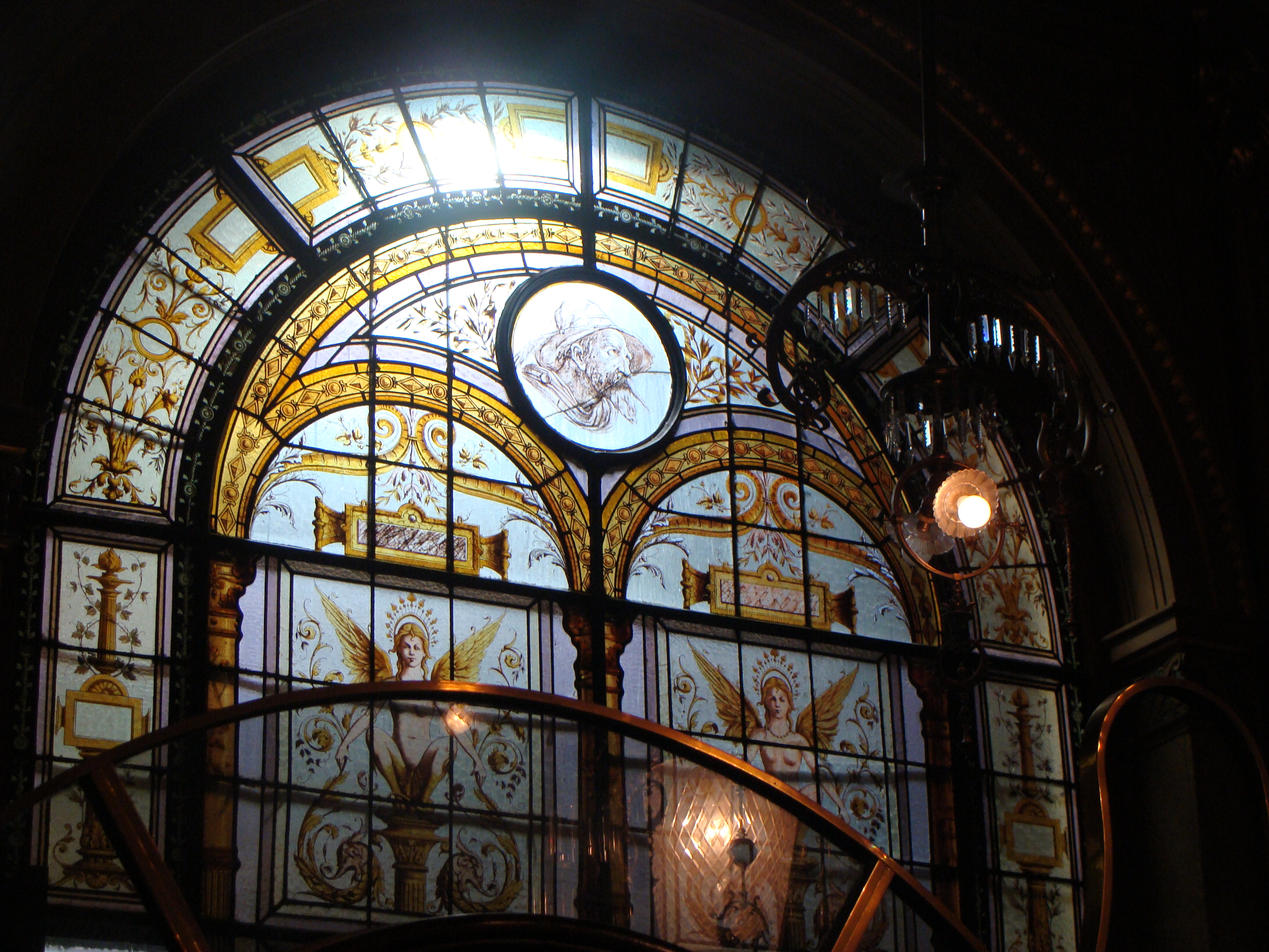 Ξενοδοχείο "Μετροπόλ", Βρυξέλλες: Βιτρώ στην αίθουσα υποδοχής, 2009